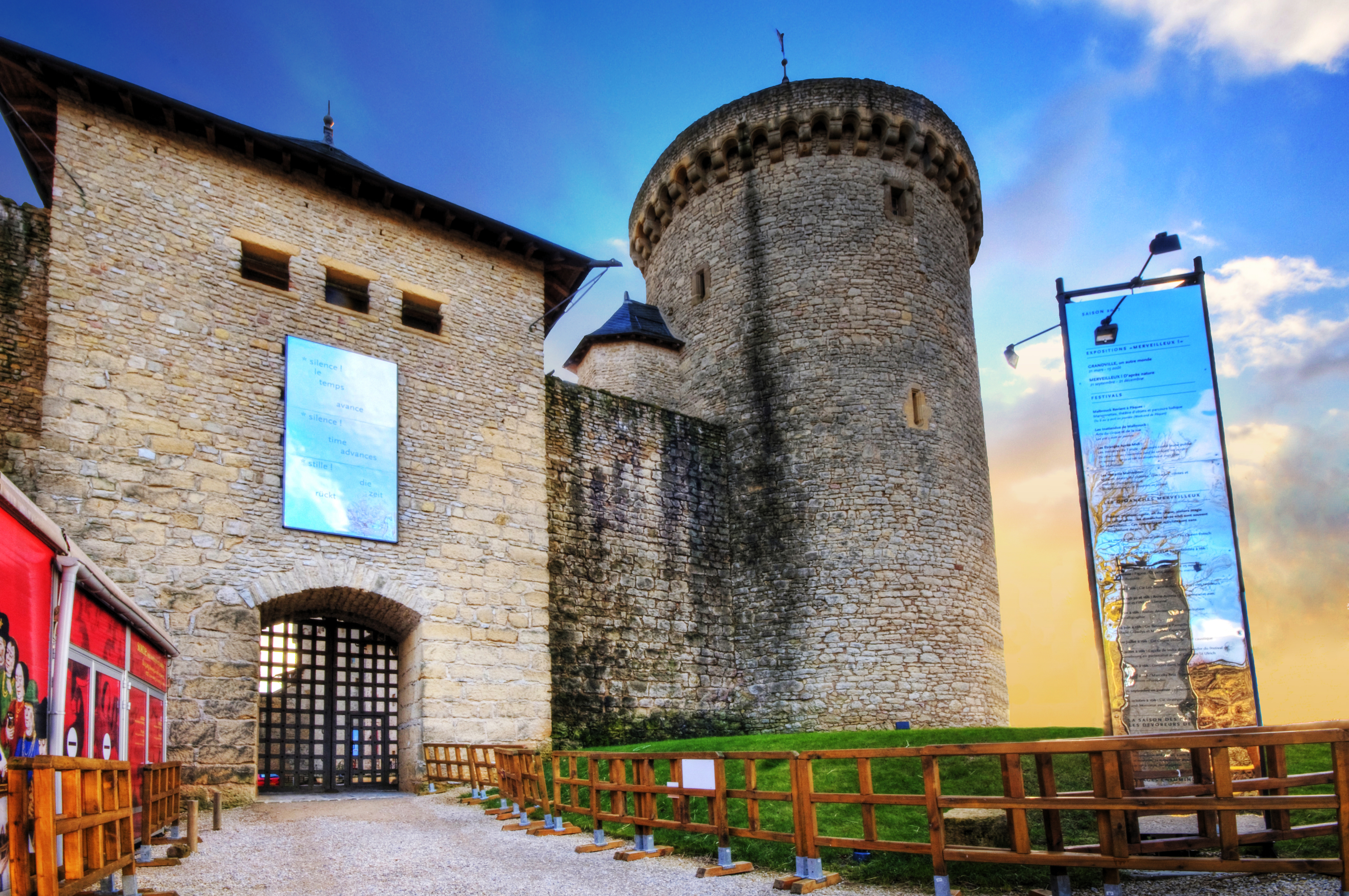 Château de Malbrouck